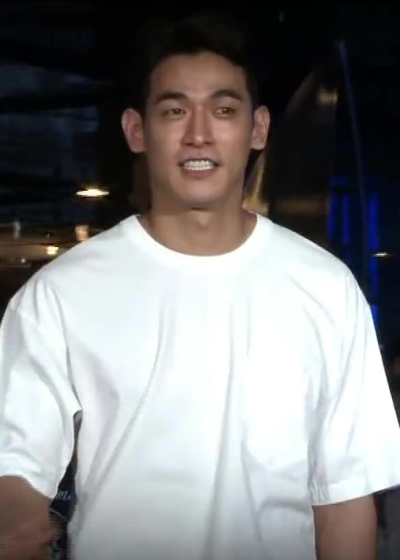 (해무) VIP시사 후기 영상